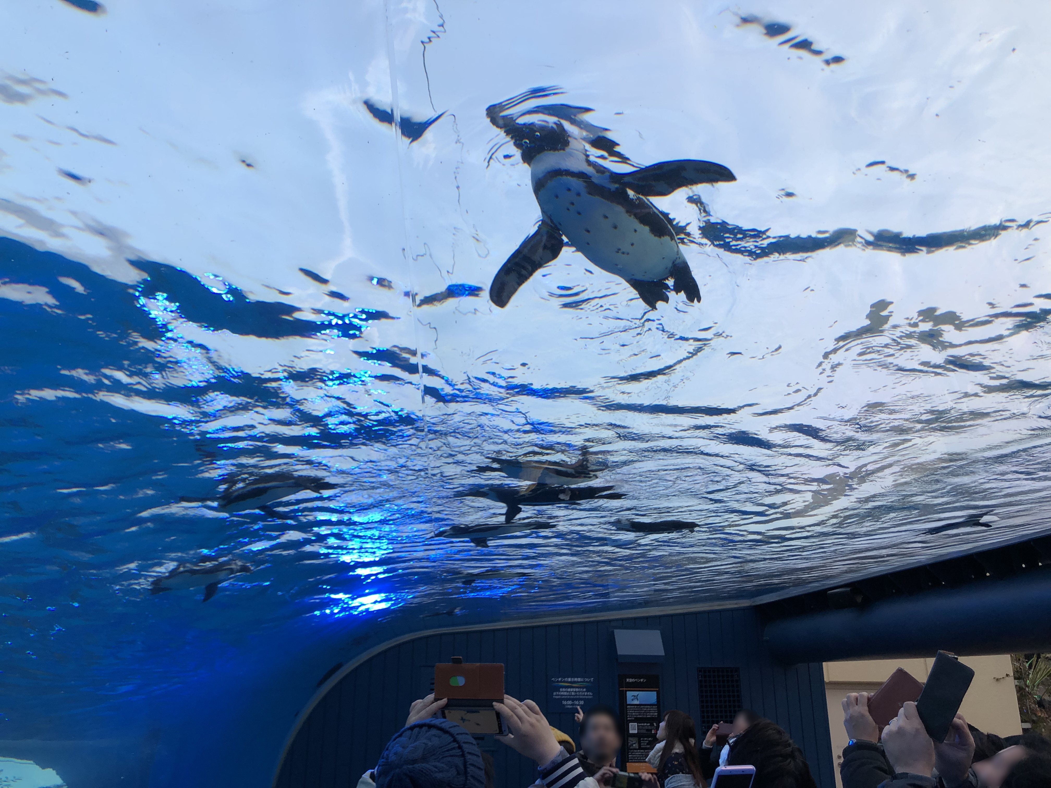 サンシャイン水族館の天空のペンギン水槽